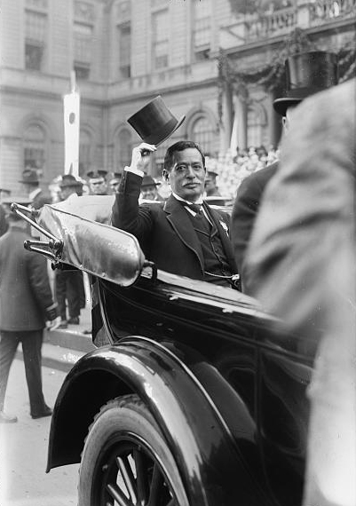 Kikujirō Ishii (石井菊次郎) , (1866–1945), a Japanese politician and diplomat